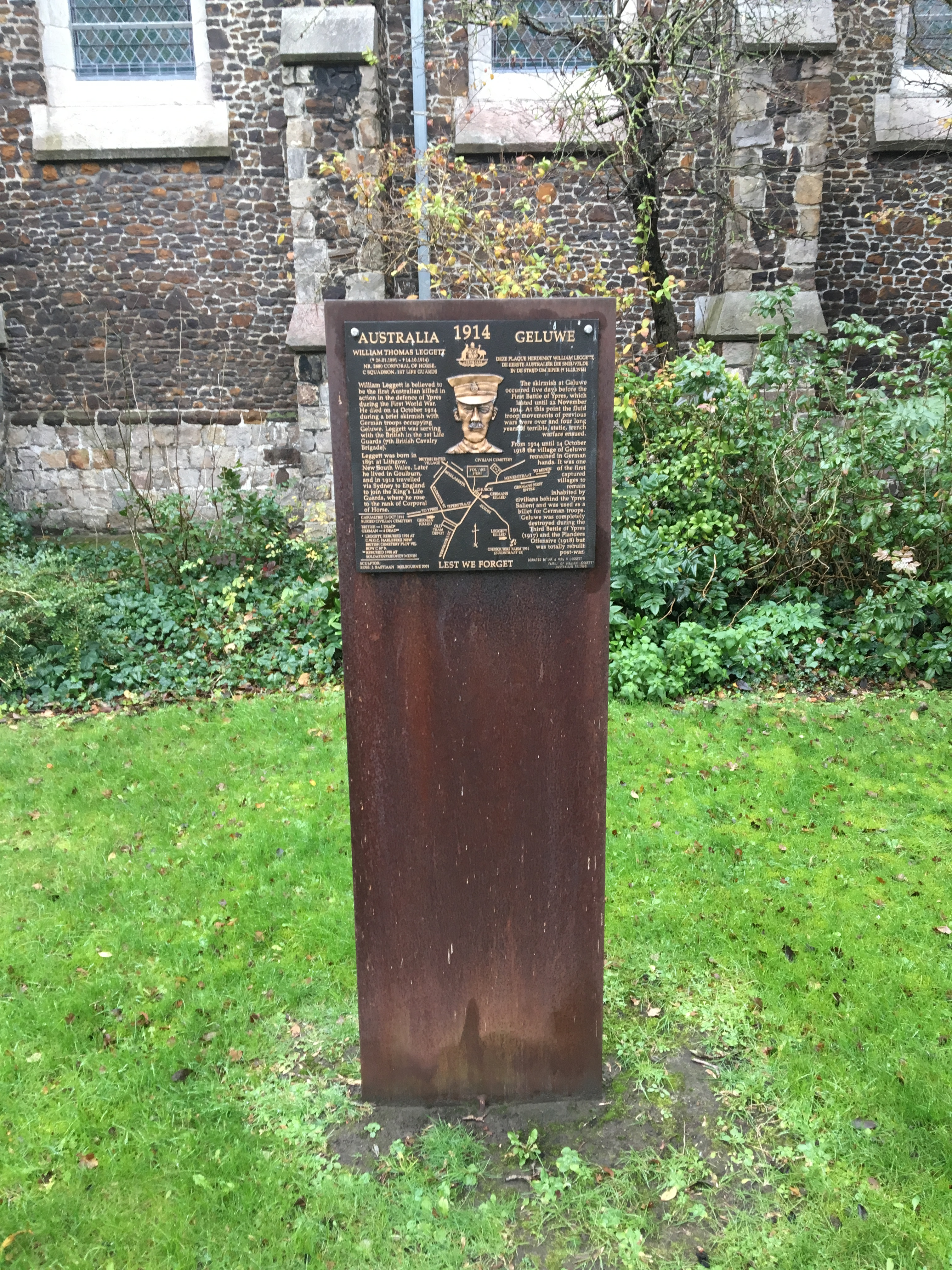 Bastiaanplaque 'William Thomas Leggett'